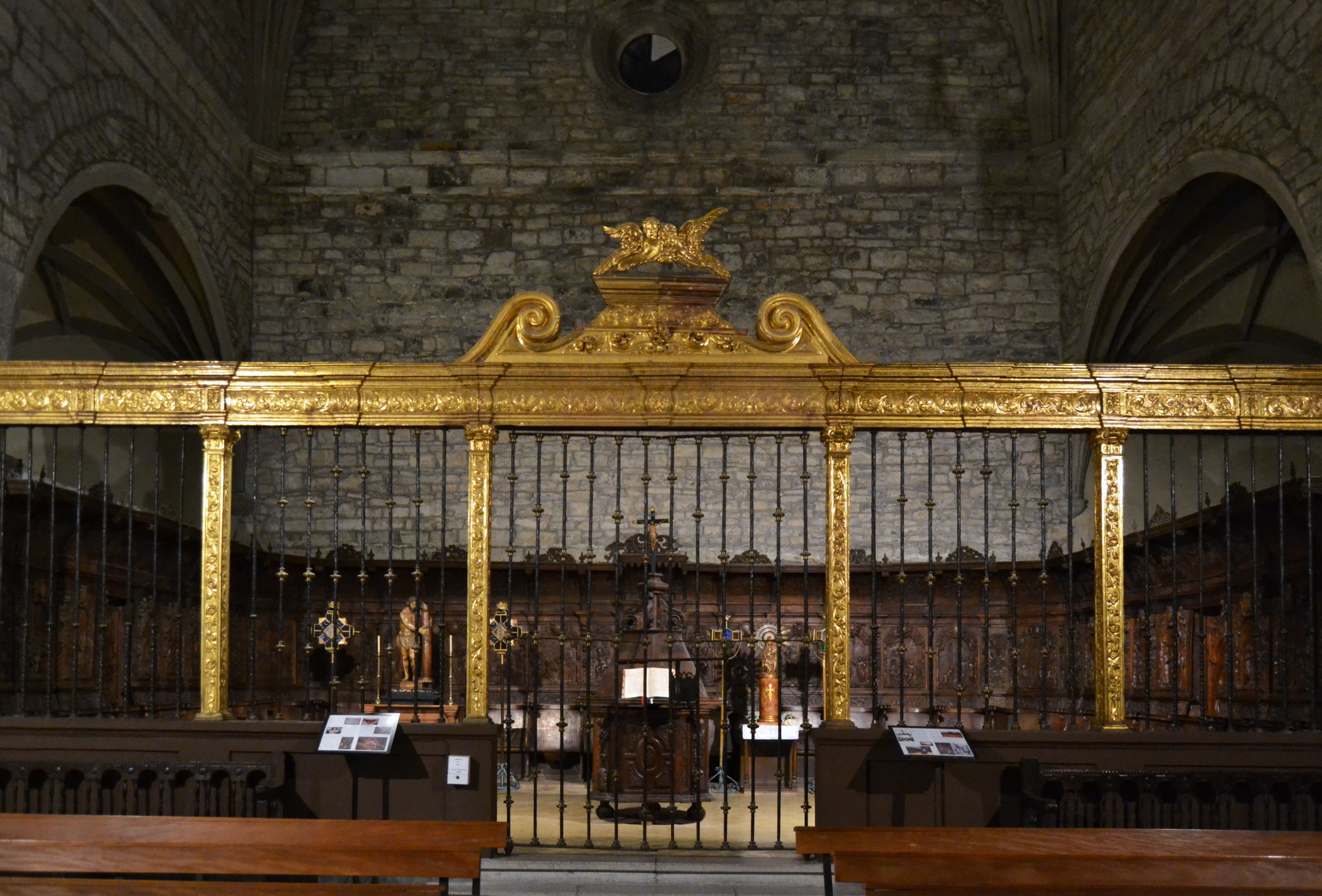 Reixa del cadirat del cor del monestir de Sant Veturián, església de sant Pere de Boltanya. Aquest cor prové del monestir benedictí de Sant Victorià (Monestério de Sant Veturián). Es composa de 27 setials, realitzats amb fusta de noguer, dotats cadascun d'ells de respatller i dosser. En els panells del respatller es representen escenes de la vida de sant Benet, emmarcades per motllures amb motius decoratius vegetals, rocalles i ovals amb tornapuntes, propis de l'estil barroc tardà (segle XVIII), com al dosser. Sota la taula del seient, les misericòrdies es decoren amb màscares grotesques o infantils. Encara que se'n desconeix l'autor i la data, per les seues característiques es considera de la primera meitat del segle XVIII, després de la construcció de la nova església monàstica (1732 - 1736). L'any 1746 el bisbat de Barbastre decideix el trasllat d'ornaments de les esglésies més aïllades a altres església de la diòcesi; a l'església de sant Pere de Boltanya li correspongué el cadirat del cor de Sant Veturián. El 1949 s'acaba el trasllat, amb canvis per adaptar-se al nou emplaçament.